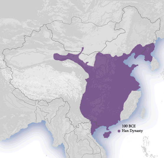 Han Dynasty 100 BCE